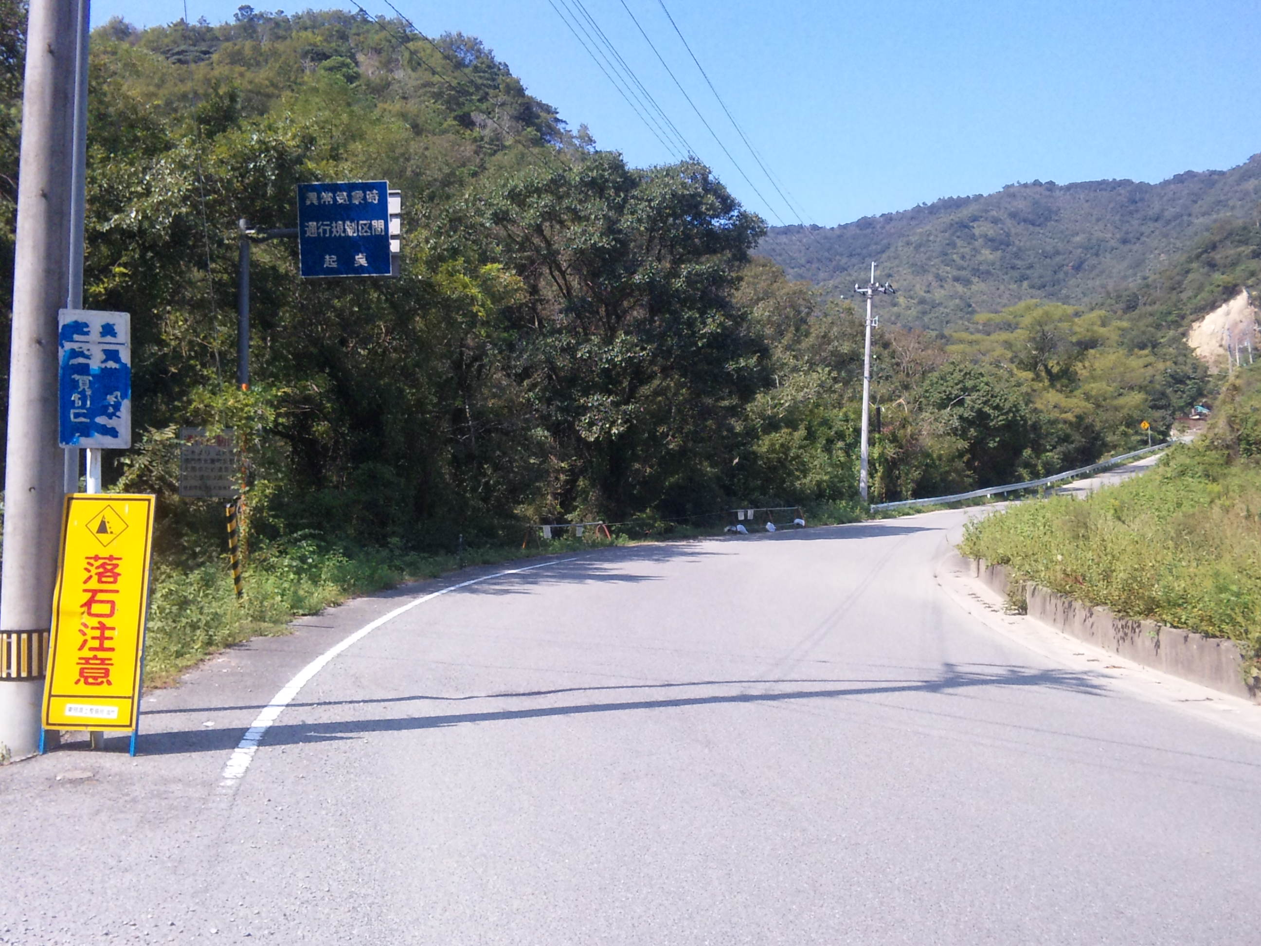 鳴門市大麻町板東にて。これ以北は山岳道路となり、荒天時には全面通行止となる。